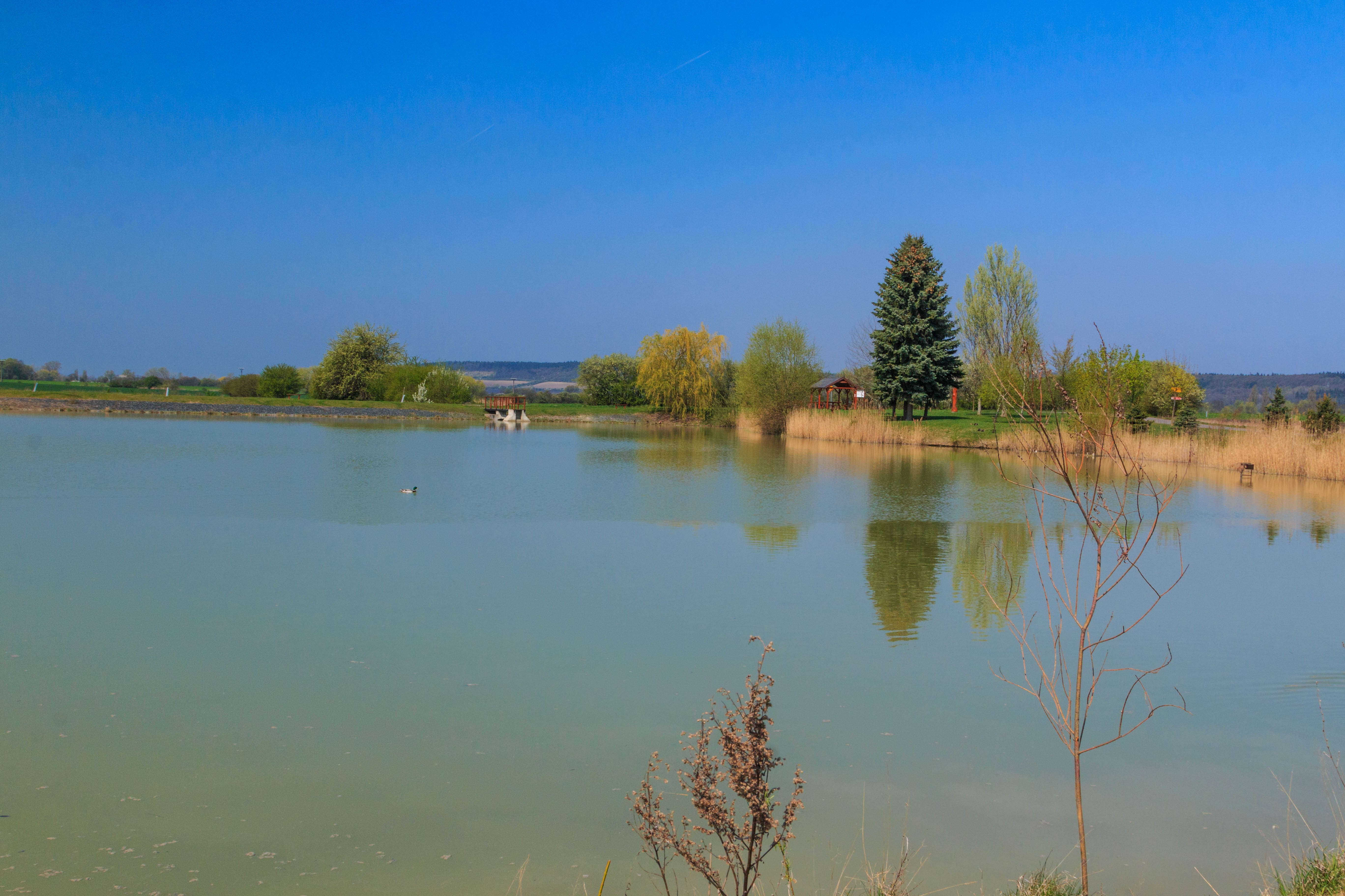 Rybník u Choťovic Project: Vodstvo.